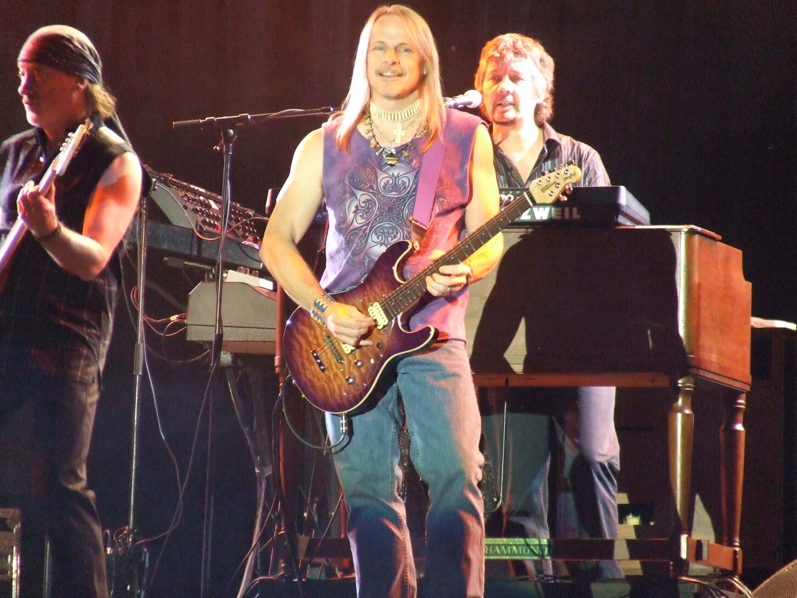 Gefotografeerd op 9 juni door Paulus_2 tijdens het Arrow Rock Festival 2006 te Lichtenvoorde Paulus_2 12 jun 2006 12:03 (CEST)